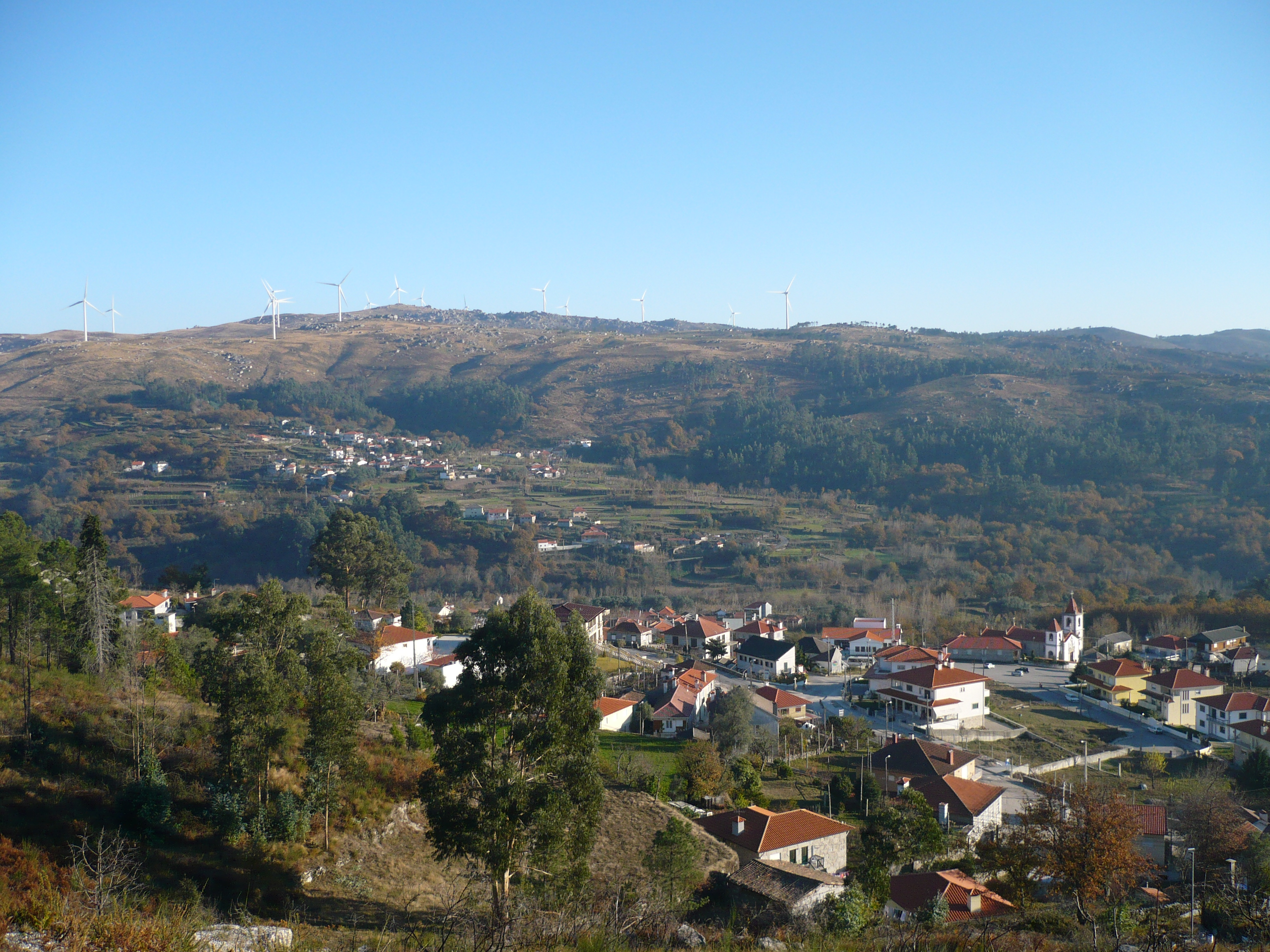 Vista geral da freguesia de Moreira do Rei